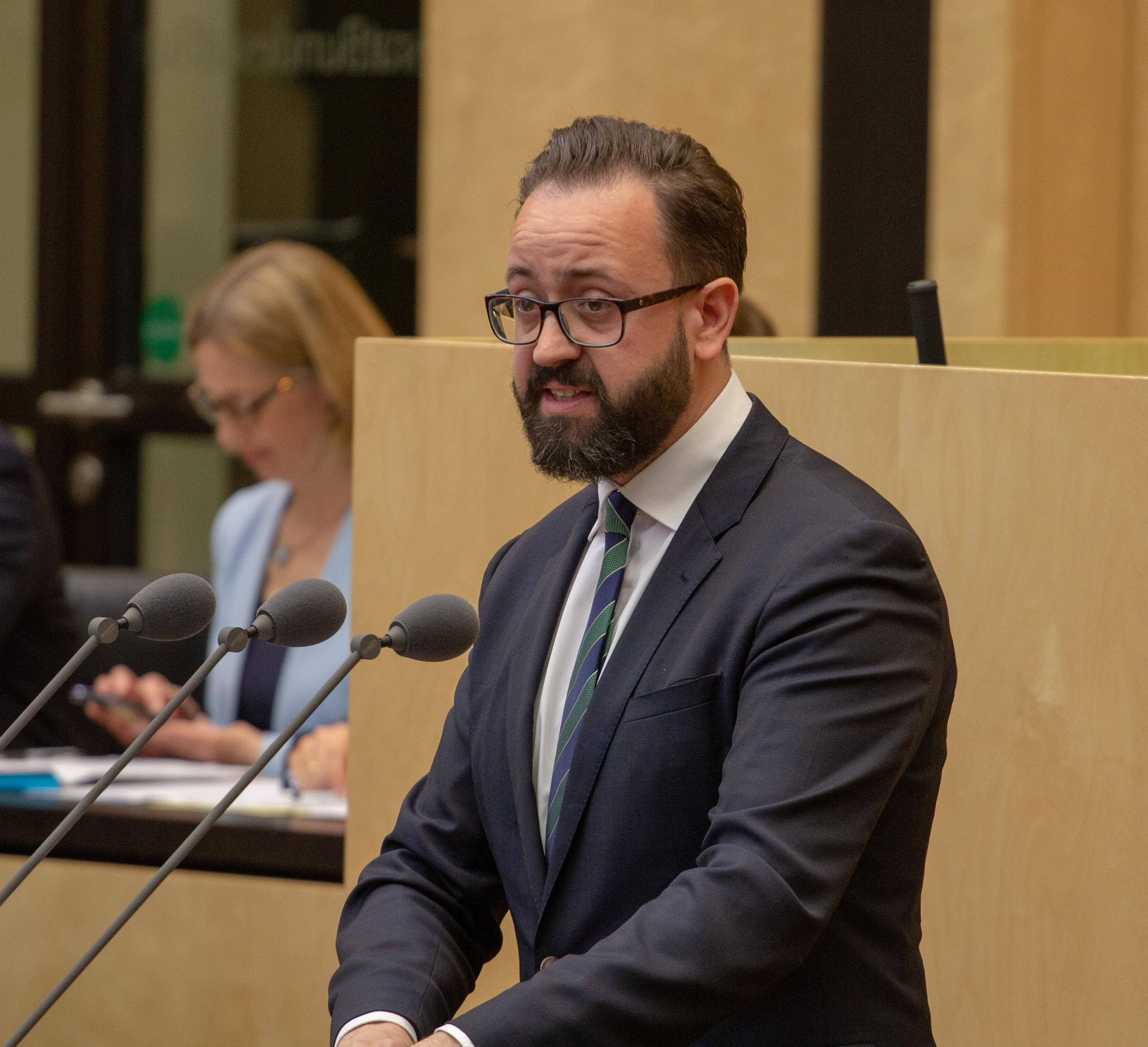 Plenarsitzung des Bundesrates am 12. April 2019 in Berlin.